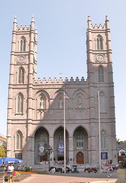 Basilique Notre-Dame de Montréal